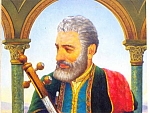 Նաղաշ Հովնաթան